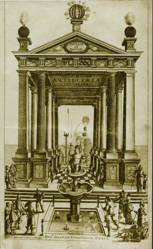 Беларуская (тарашкевіца): Казімер Семяновіч. Тытульны аркуш кнігі "Вялікае мастацтва артылерыі" (лац. "Artis magnae artileriae pars prima")